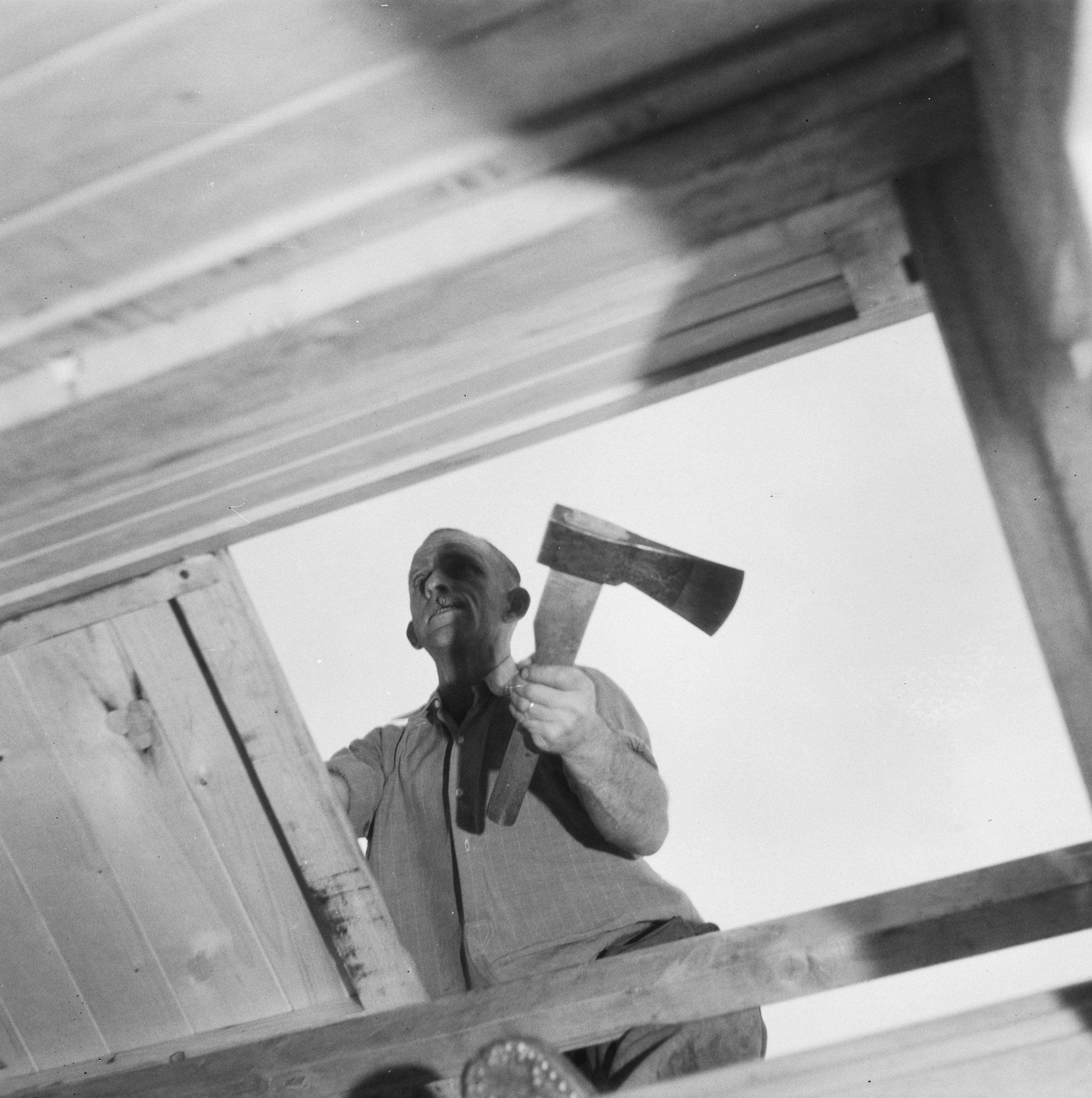 Collectie / Archief : Fotocollectie Anefo Reportage / Serie : Walcheren: Herstelling Nollegat in de zeedijk en andere plaatsen in Walcheren Beschrijving : Barakkenbouw (geschonken door Zwitserland). Man met bijl Datum : oktober 1945 Locatie : Walcheren Trefwoorden : herstel, tweede wereldoorlog, wederopbouw Fotograaf : Blazer, Carel / Anefo Auteursrechthebbende : Nationaal Archief Materiaalsoort : Negatief (zwart/wit) Nummer archiefinventaris : bekijk toegang 2.24.01.03 Bestanddeelnummer : 900-7623